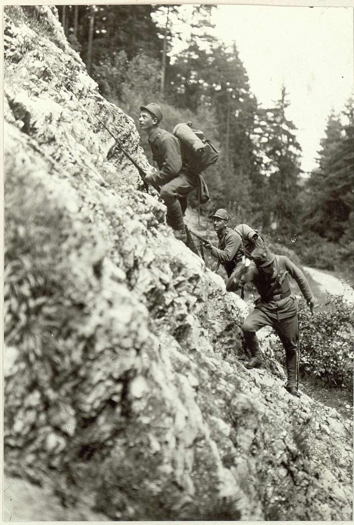 Kriegsalbum 29, Bild 7983